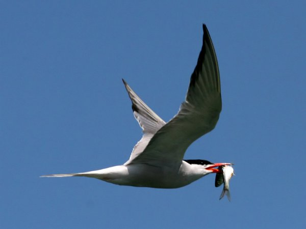 Tern (Sterna hirundo)